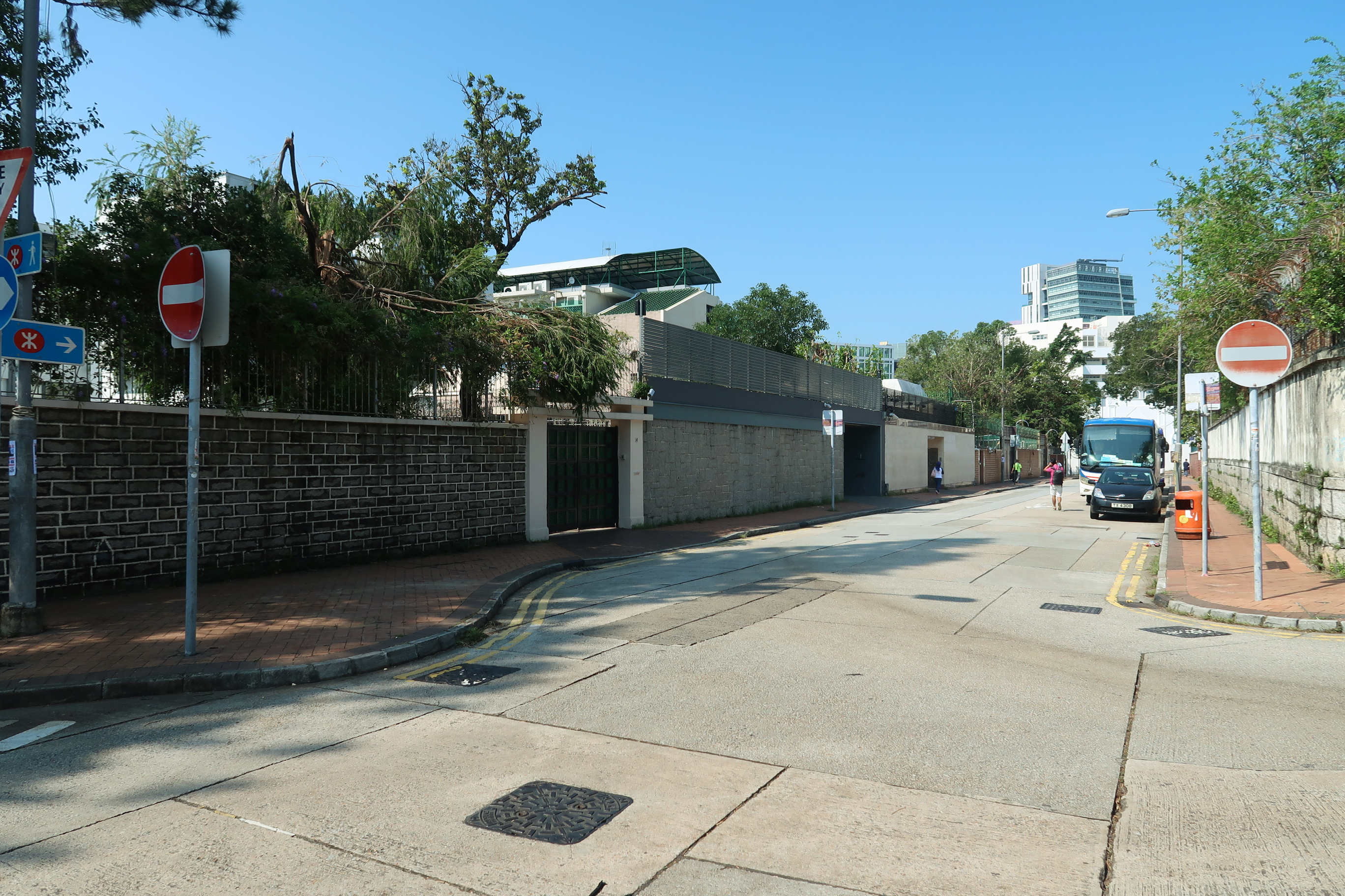 Somerset Road